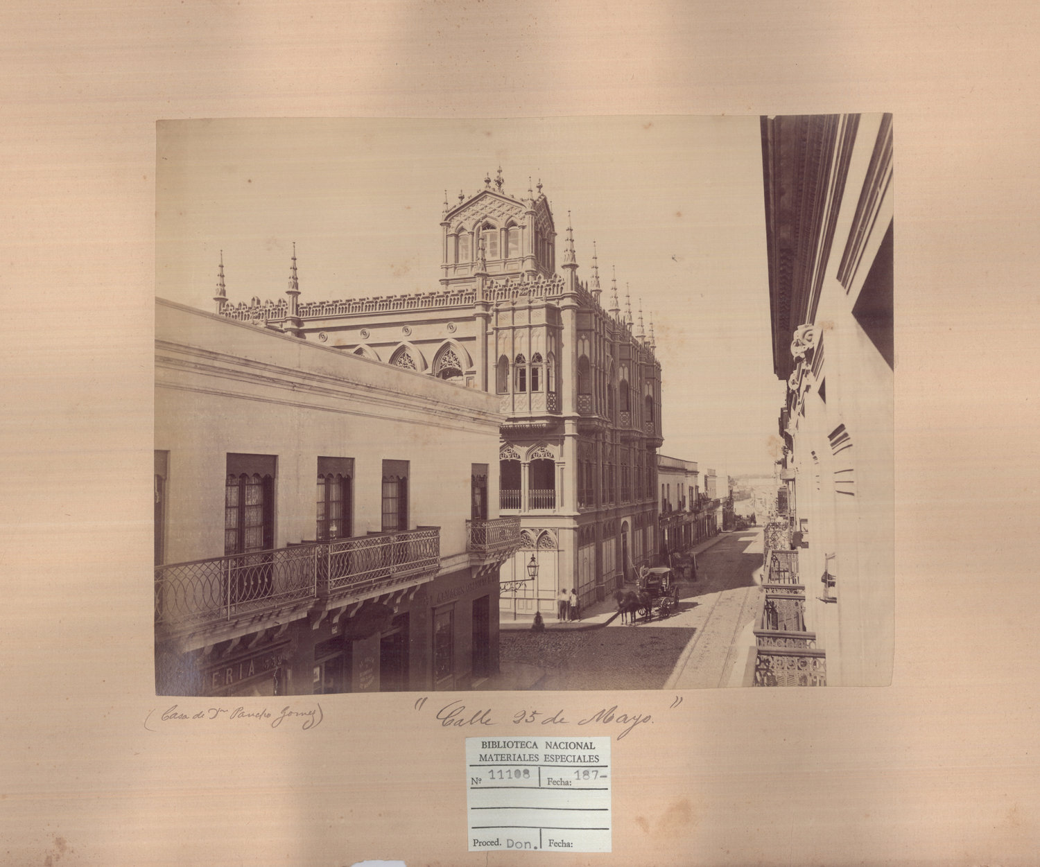 Colección Biblioteca Nacional de Uruguay